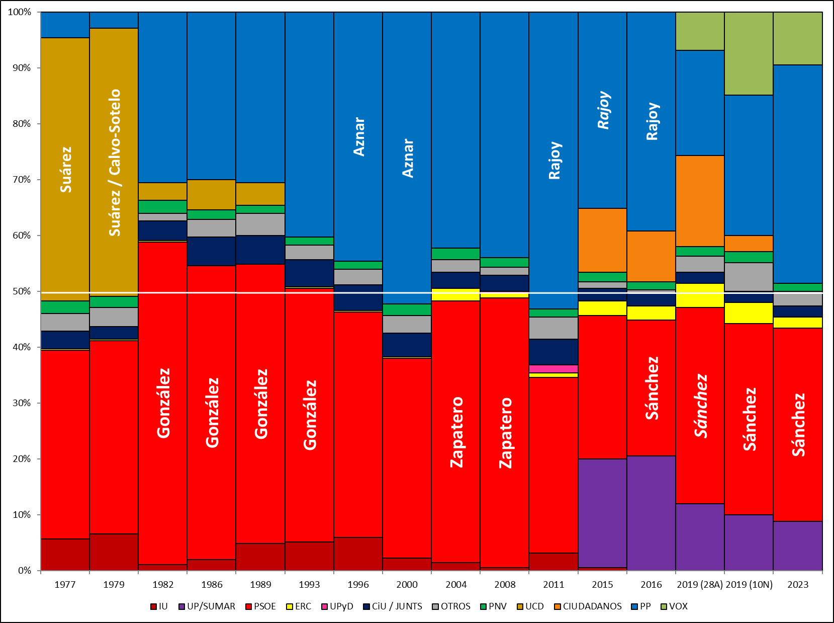 Gráfico de barras de diputados electos en las elecciones generales desde 1977. El nombre de la persona investida como presidente del gobierno aparece en la barra correspondiente su partido. En caso de legislatura fallida (sin investidura exitosa) el presidente en funciones aparece en cursiva.